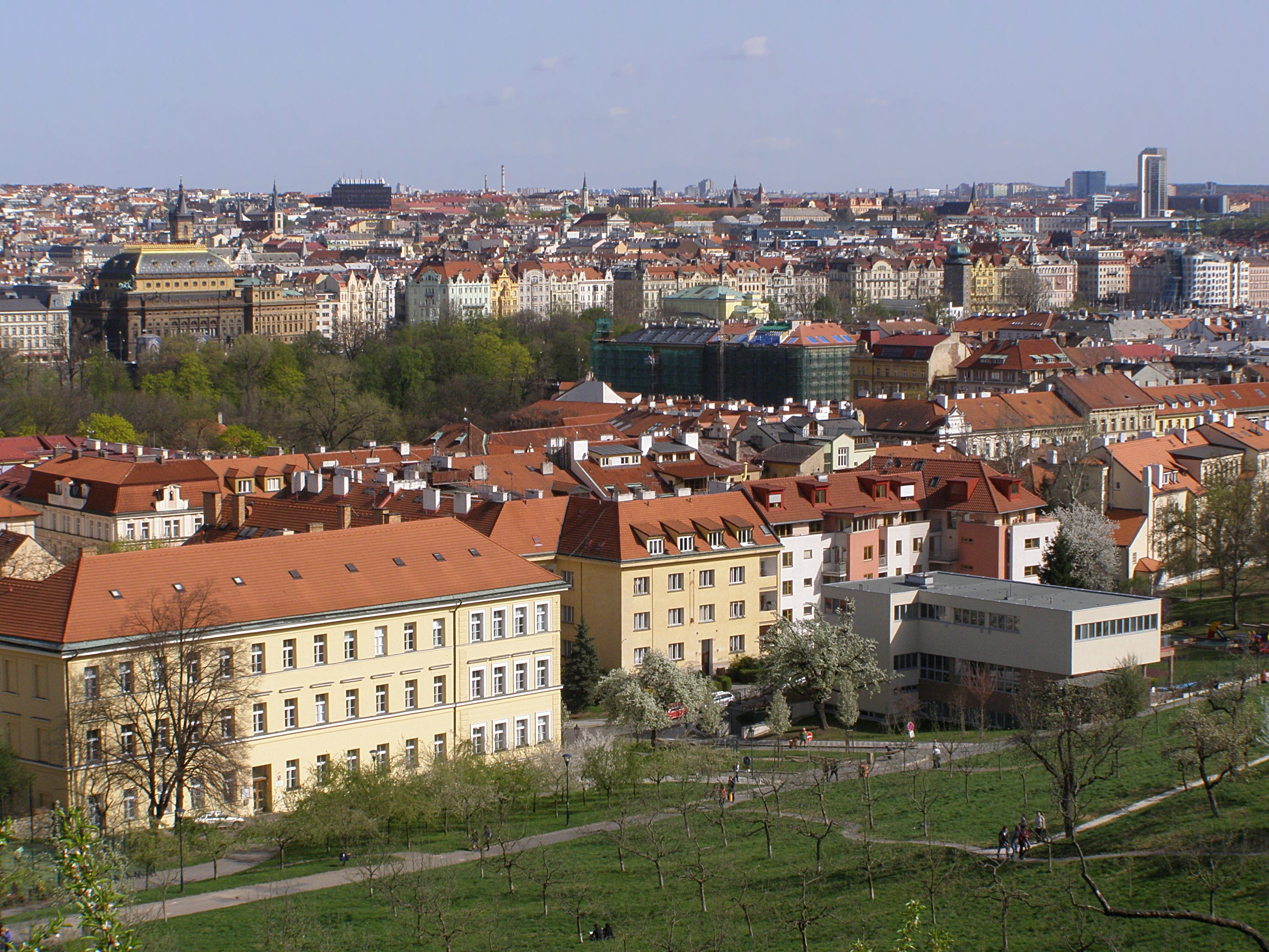 Praha, Malá Strana, výhled ze Seminářské zahrady na jihovýchod: v popředí ulice Újezd, v pozadí Nové Město